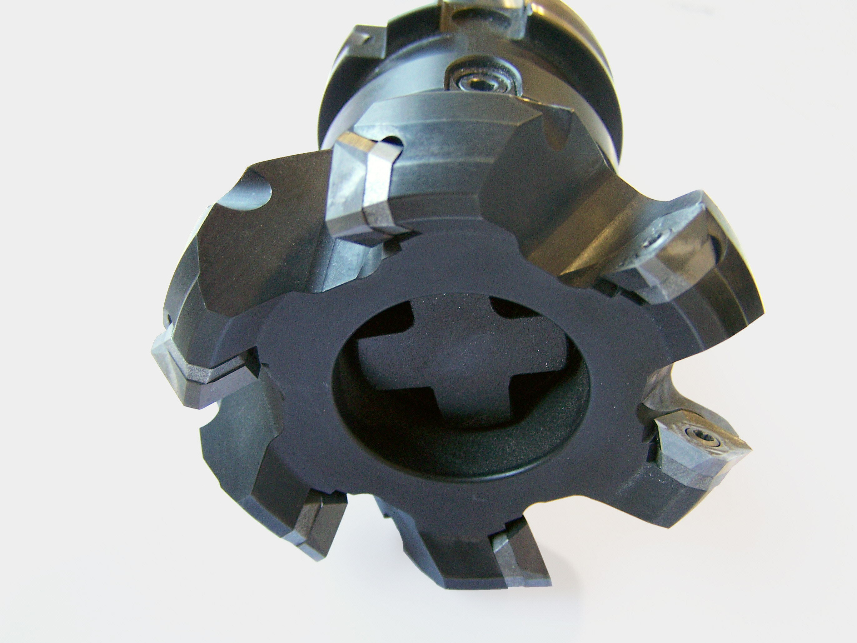 Vollhartmetall Wendeschneidplatte 45° Fräßstahl im Halter (Schlichten)